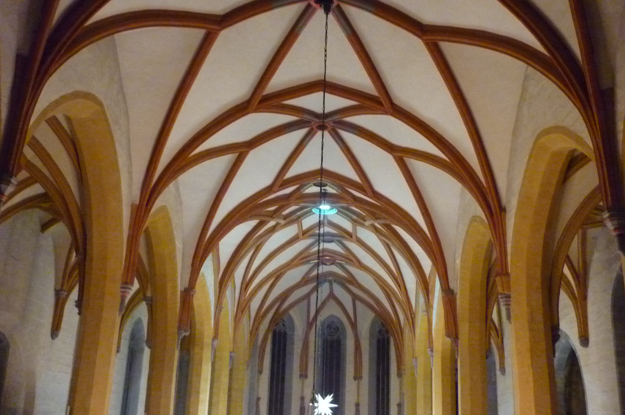 Gewölbe über dem Langhaus der Stadtkirche St. Michael Jena